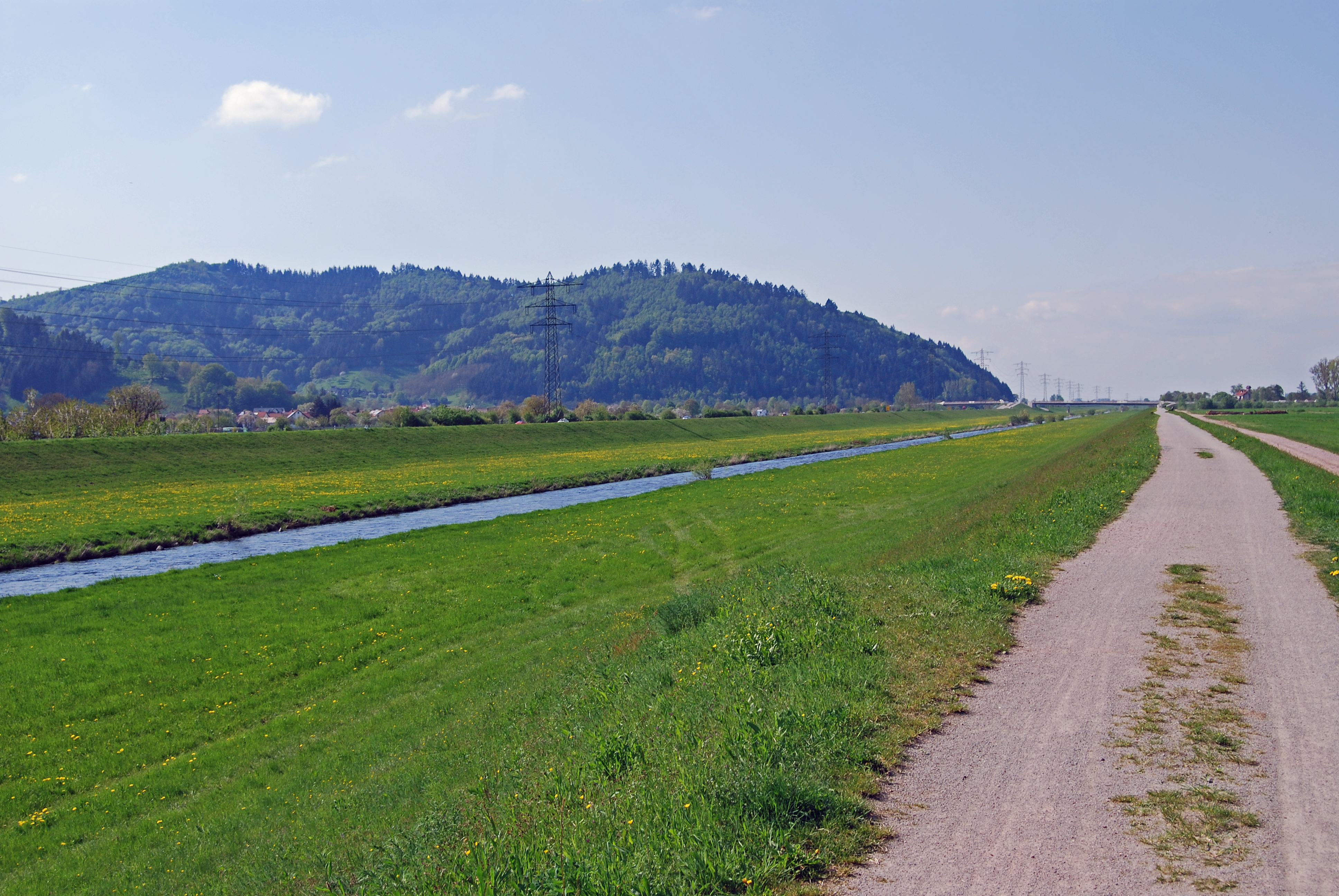 Kinzig in Gengenbach